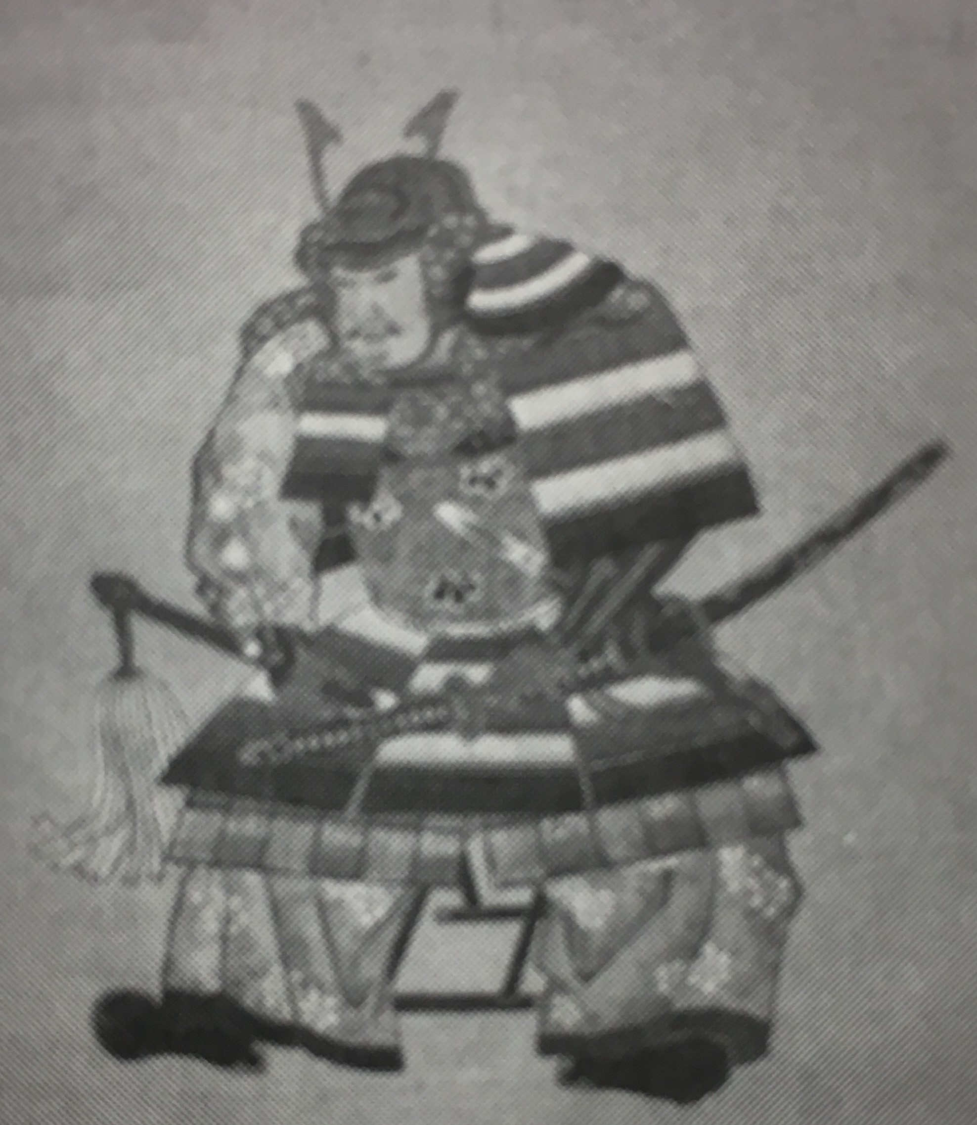 松平近正の肖像(モノクロ)。